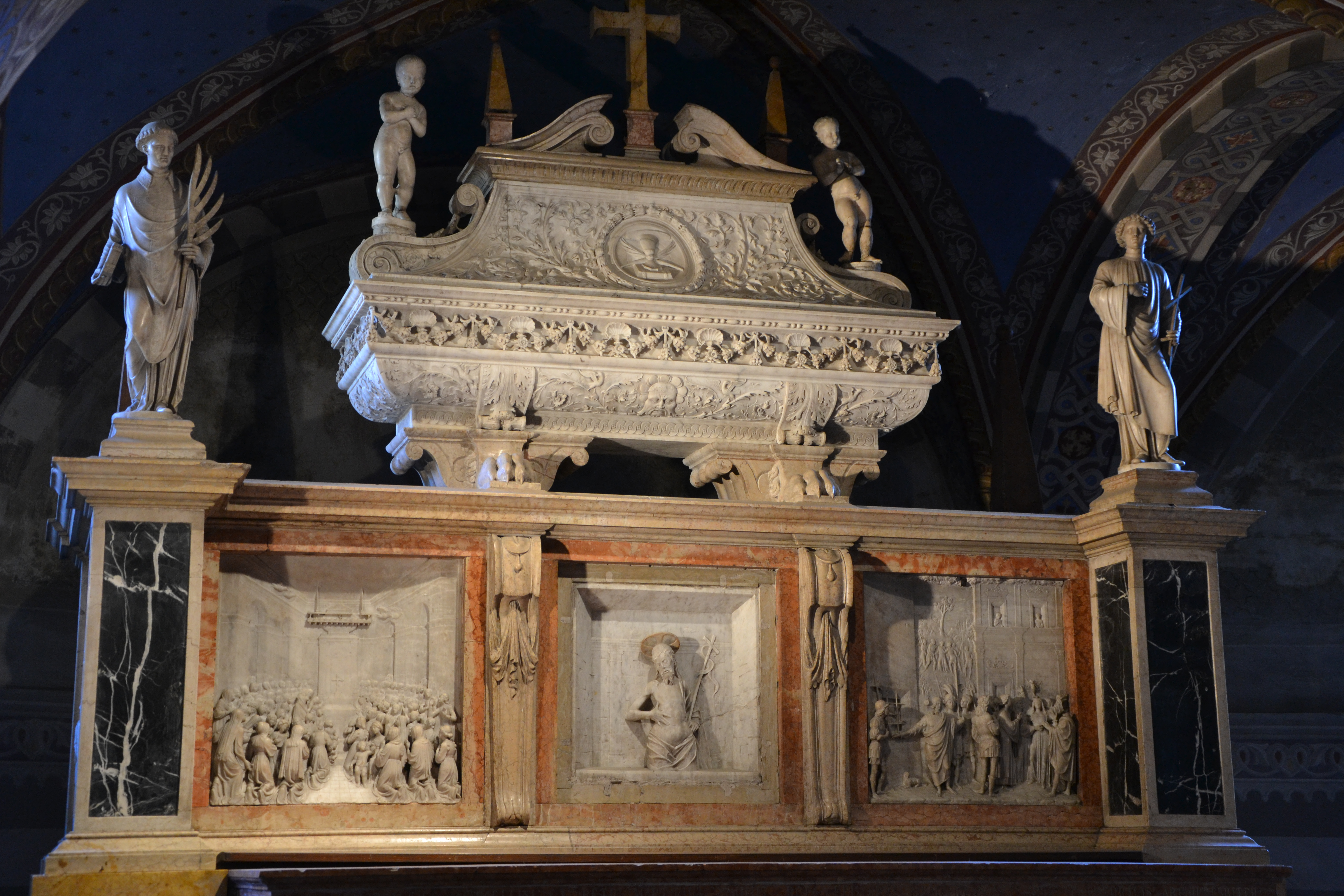 Duomo di Cremona, cripta, Arca dei SS. Marcellino e Pietro, opera di Benedetto Briosco, eseguita nel 1506; le fasce scolpite illustrano la “Vita dei due Santi Martiri”, mentre la figura centrale del “Cristo Risorto” proviene dall'Arca di S. Arealdo dell'Amadeo.